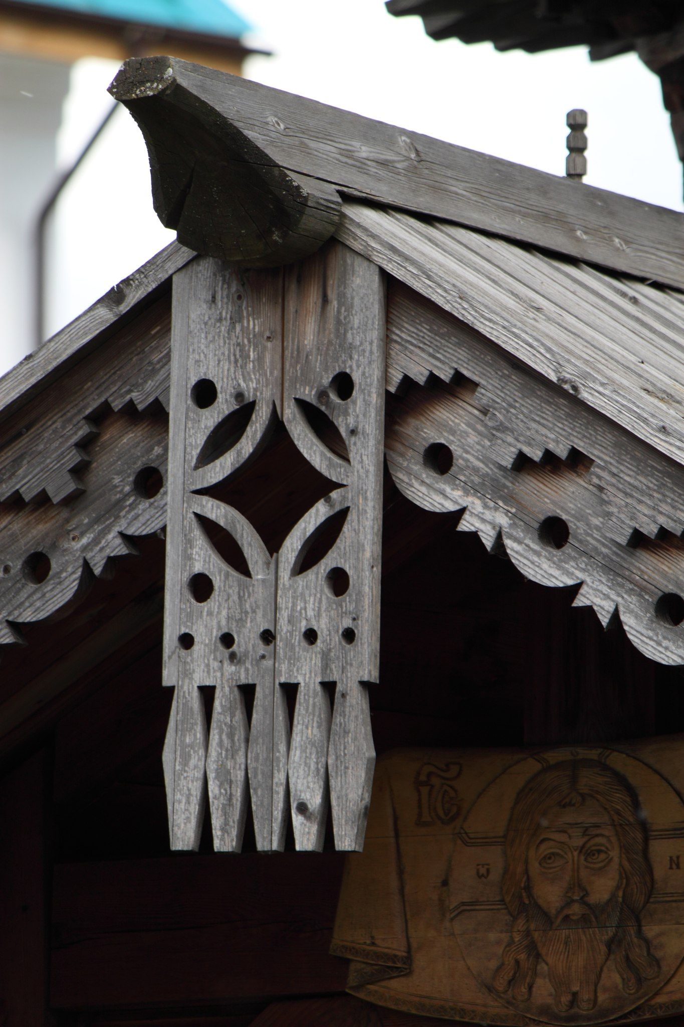 Момовая резьба церкви Серафима Вырицкого в Купчино (Санкт-Петербург)